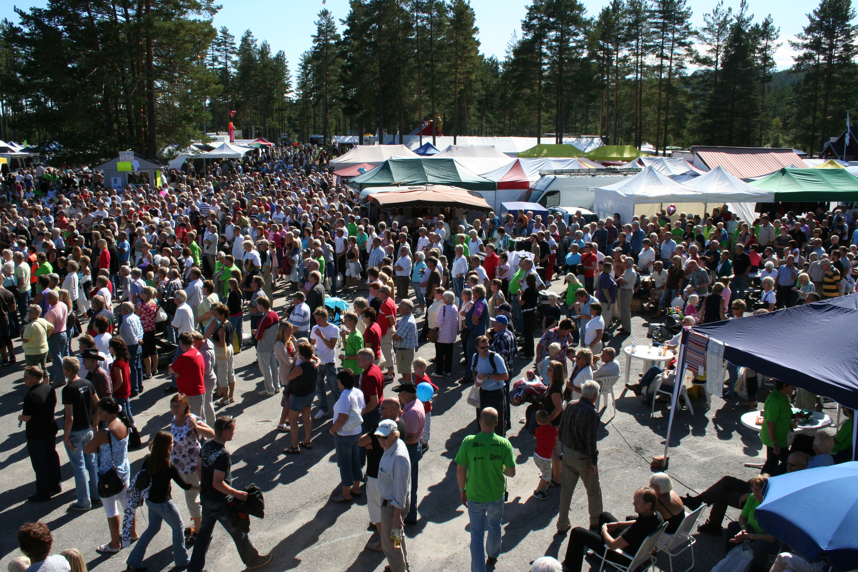 Menneskemengde på Dølemo-marknaden 2008